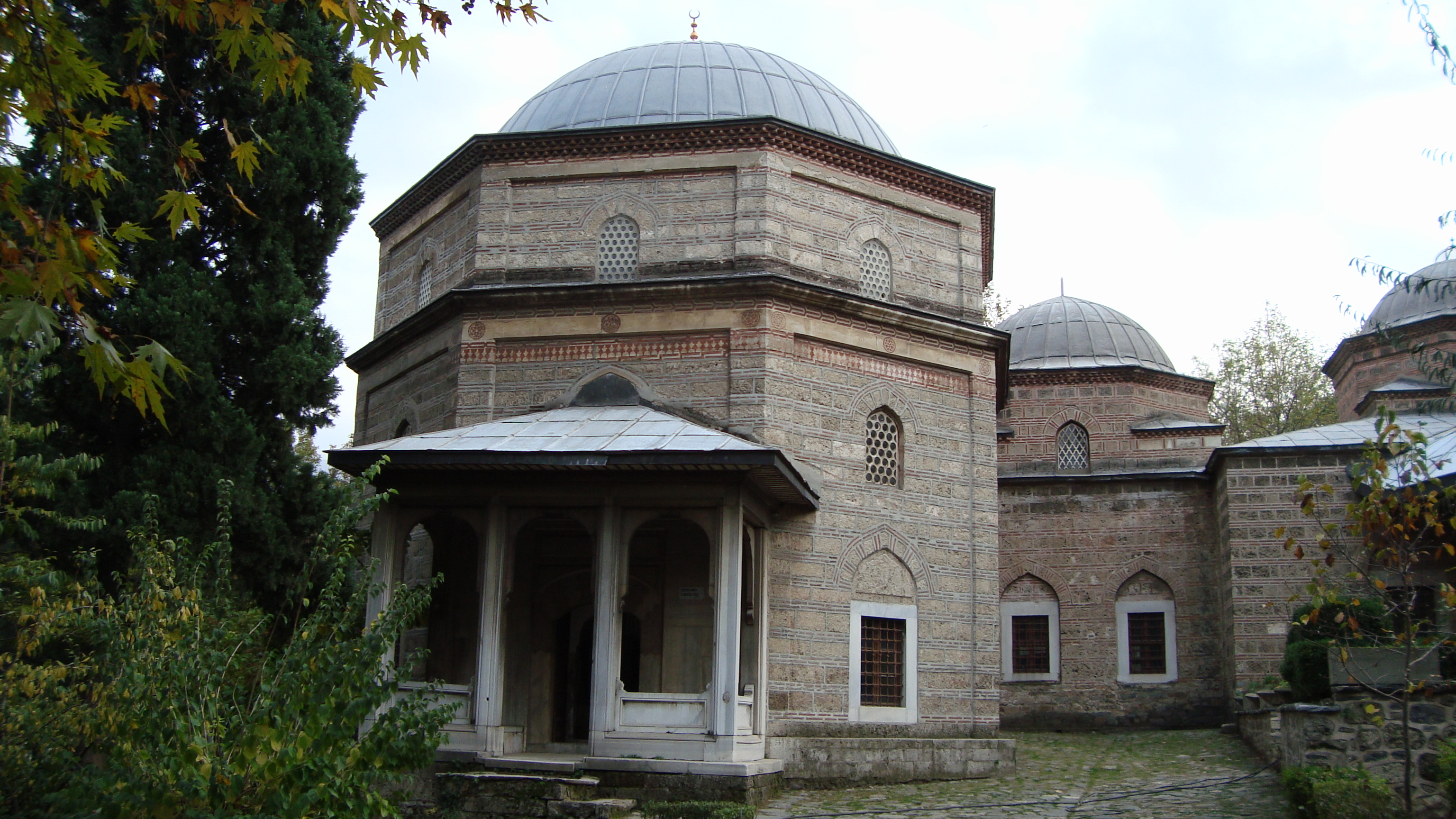 MURADİYE TÜRBELER